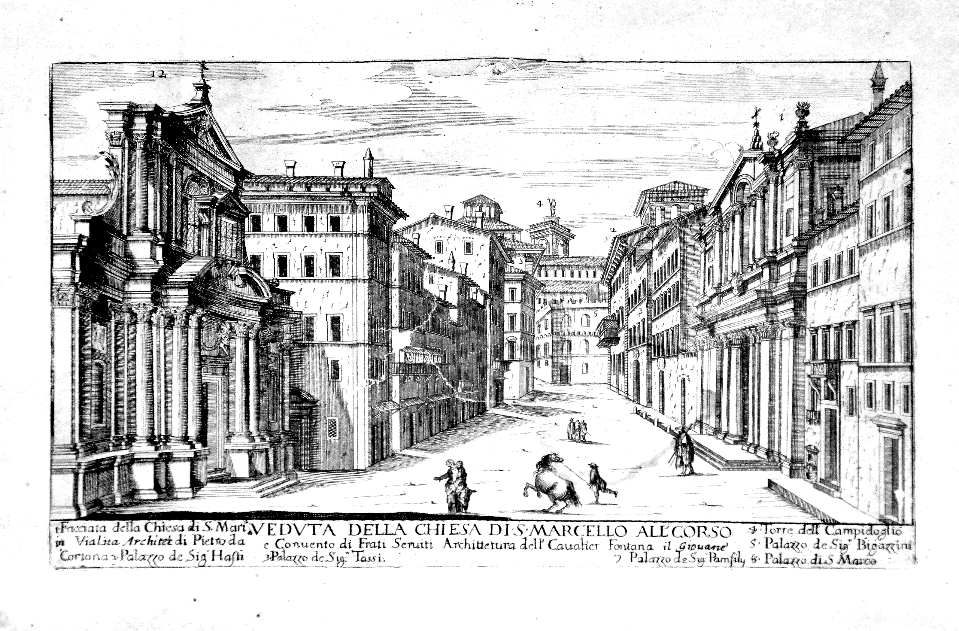 Veduta della chiesa di S. Marcello All Corso Conuento di Frati Seruiti Archittetura dell Caualier Fontana il Griouane